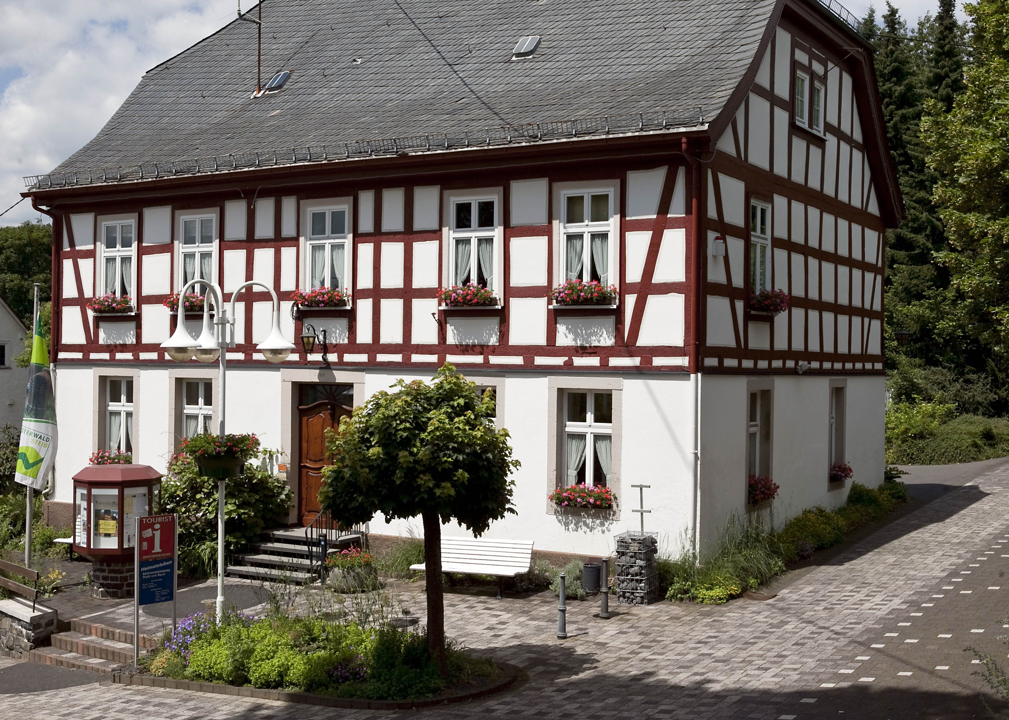 Tourist-Information Bad Marienberg